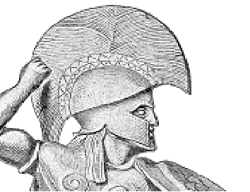 קסדה של הופליט מהצבא היווני העתיק